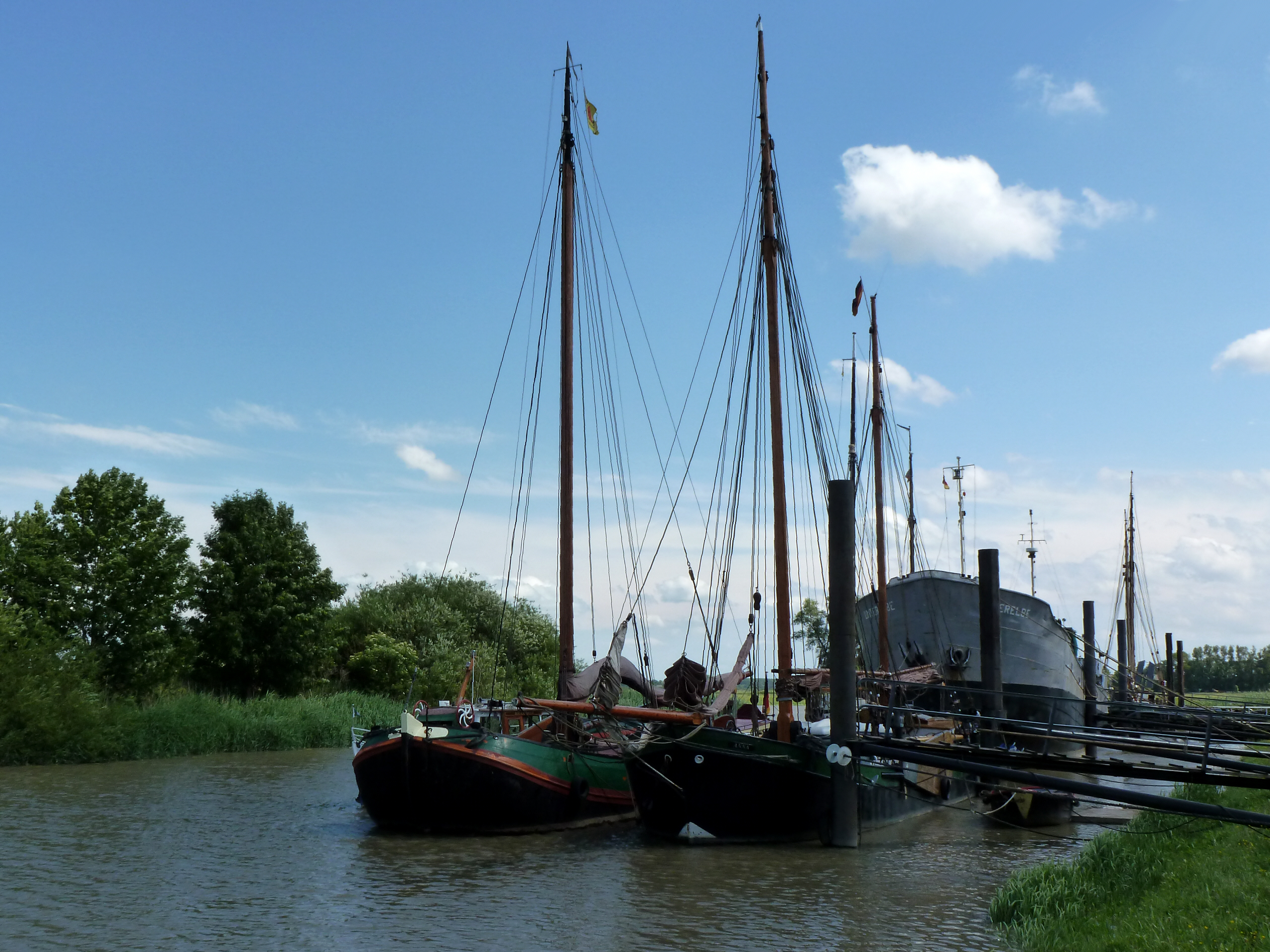 Wischhafen an der Unterelbe. Historische Lastensegler (Ewer) im Museumshafen.